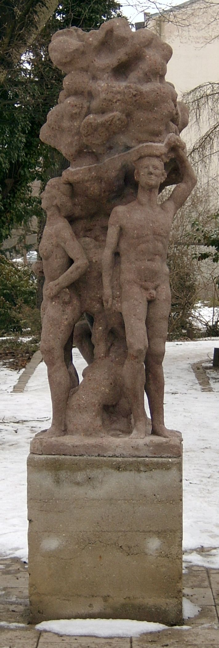 Die Skulptur Apfelpflücker im Lennépark in Frankfurt (Oder)